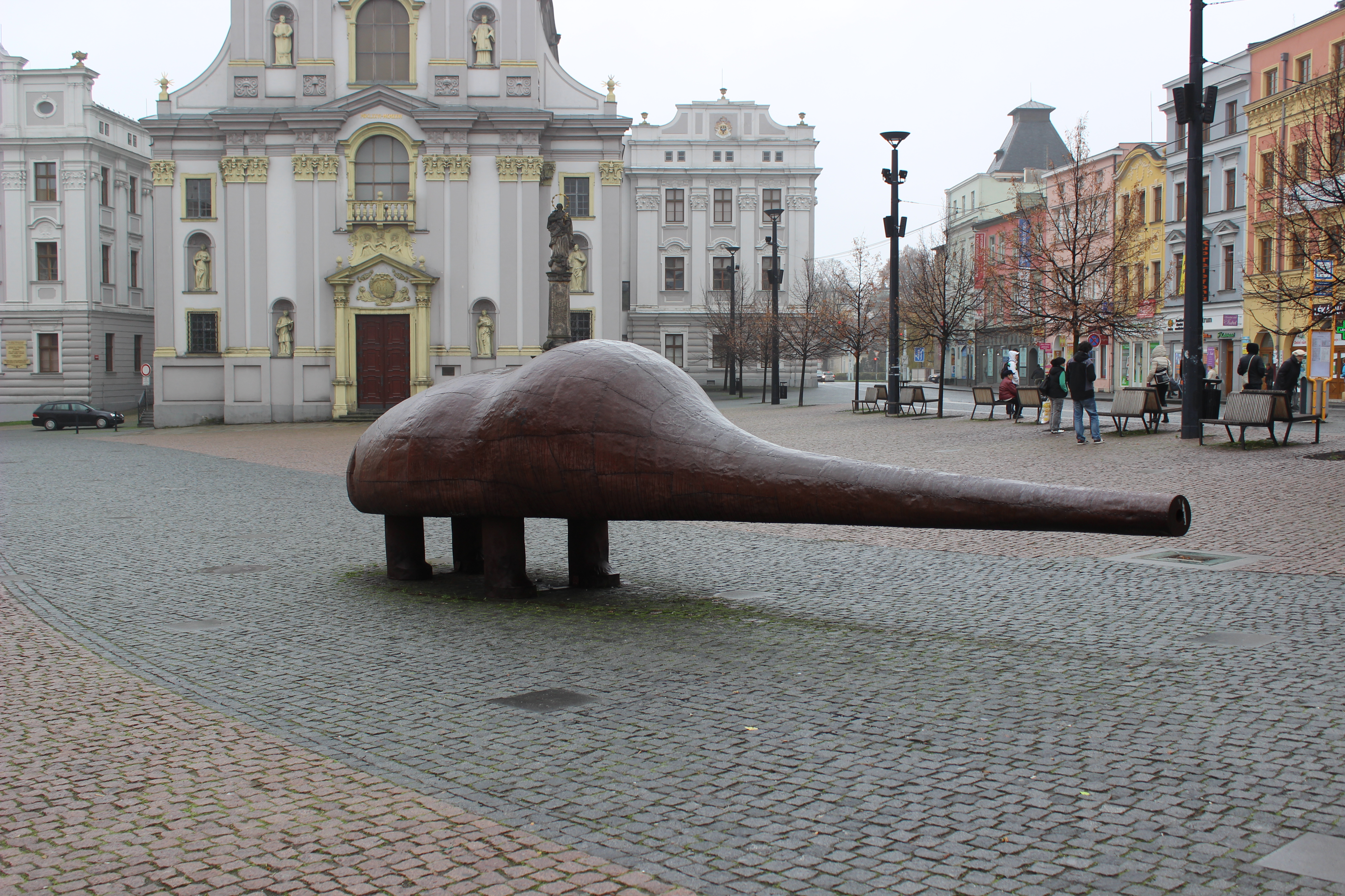 Skulptura na Dolním náměstí v Opavě.